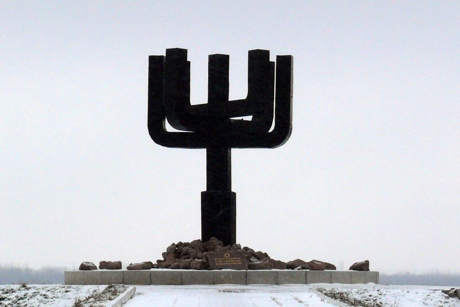 Drobitskiy menora